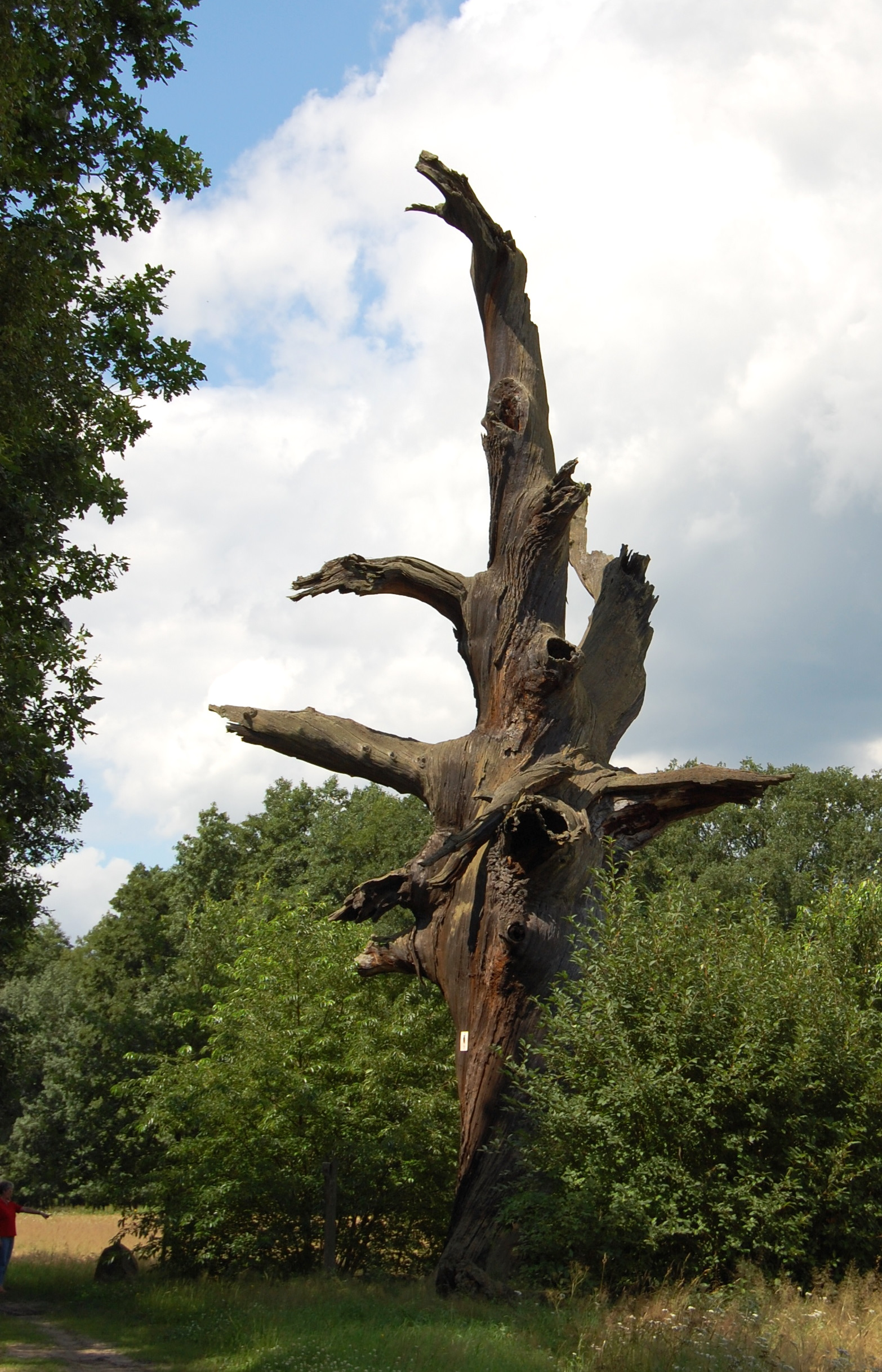 Florentine-Eiche bei Straupitz, Brandenburg, Deutschland.